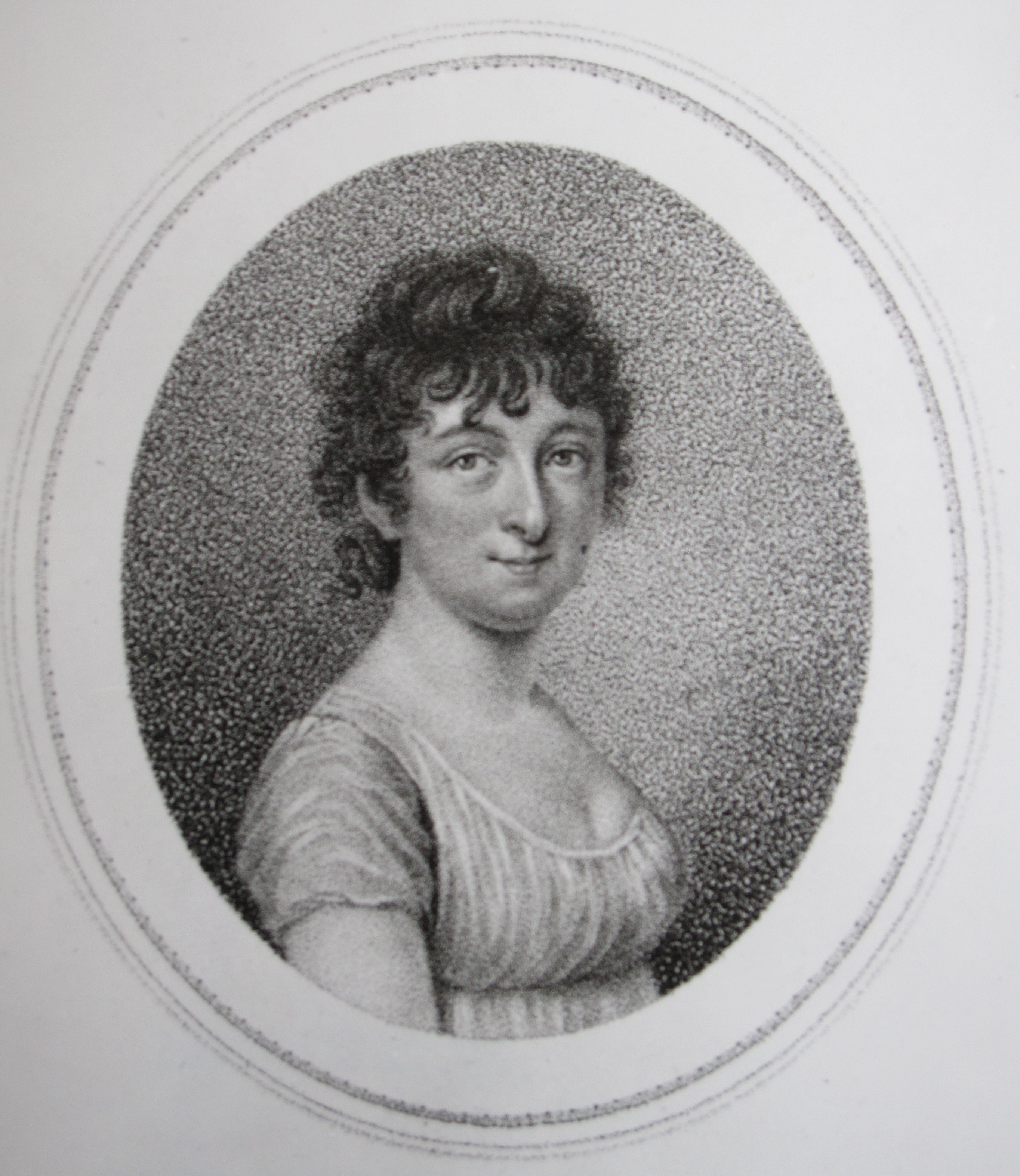 Jugendfoto von Johanna Franul von Weissenthurn